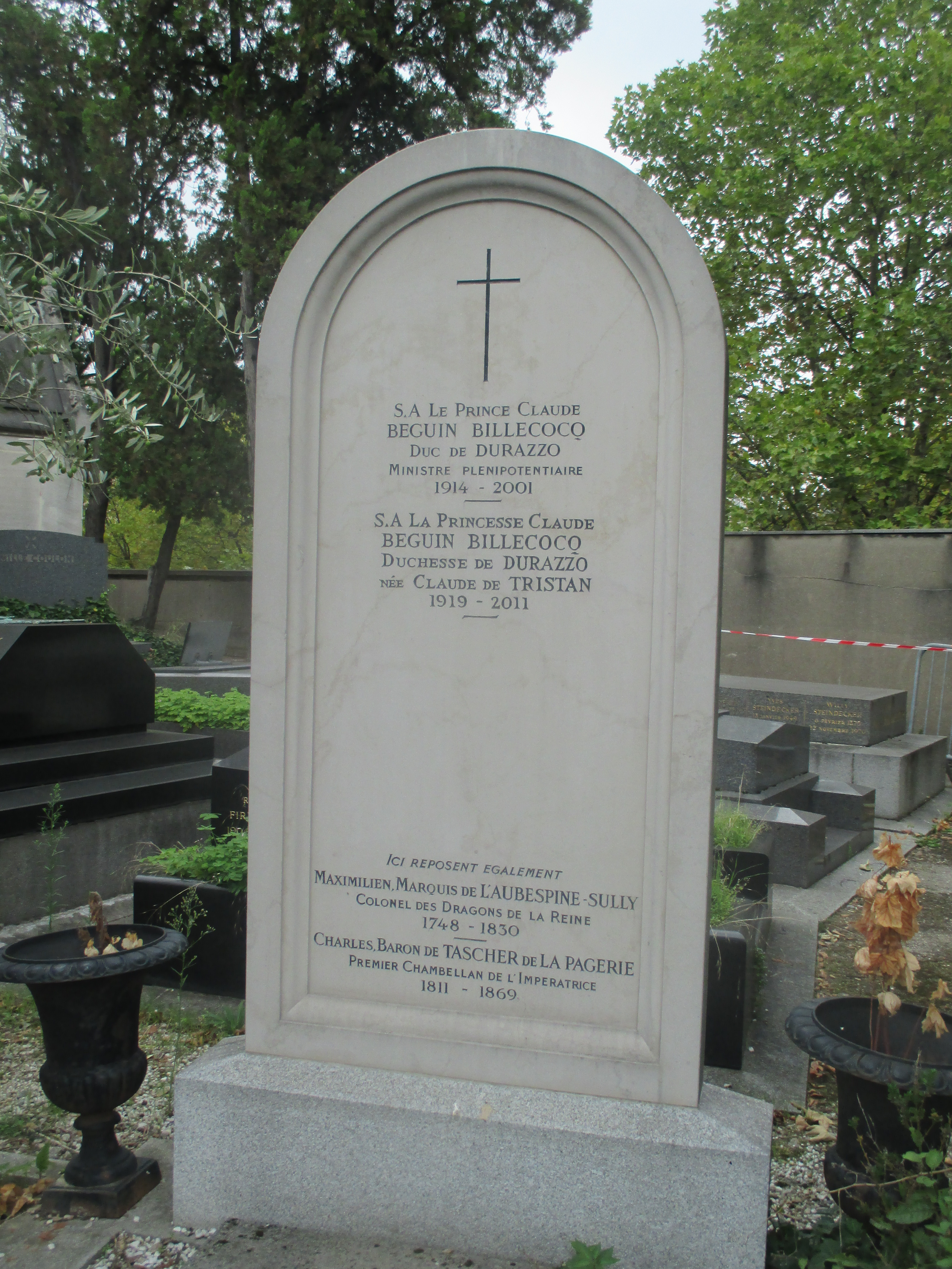 Cimetière de Passy.